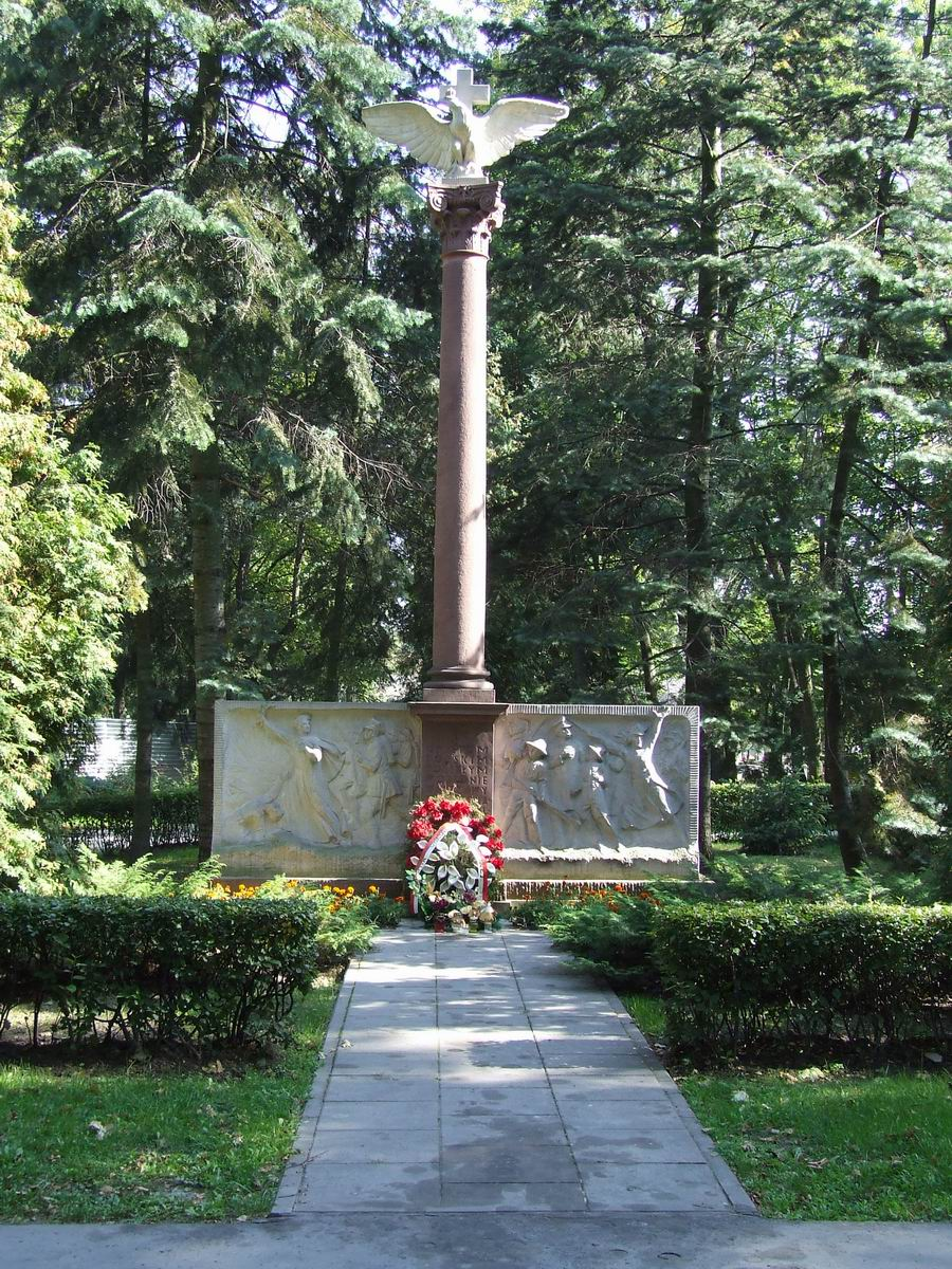 Kwatera żołnierzy 1920 na cmentarzu na Powązkach